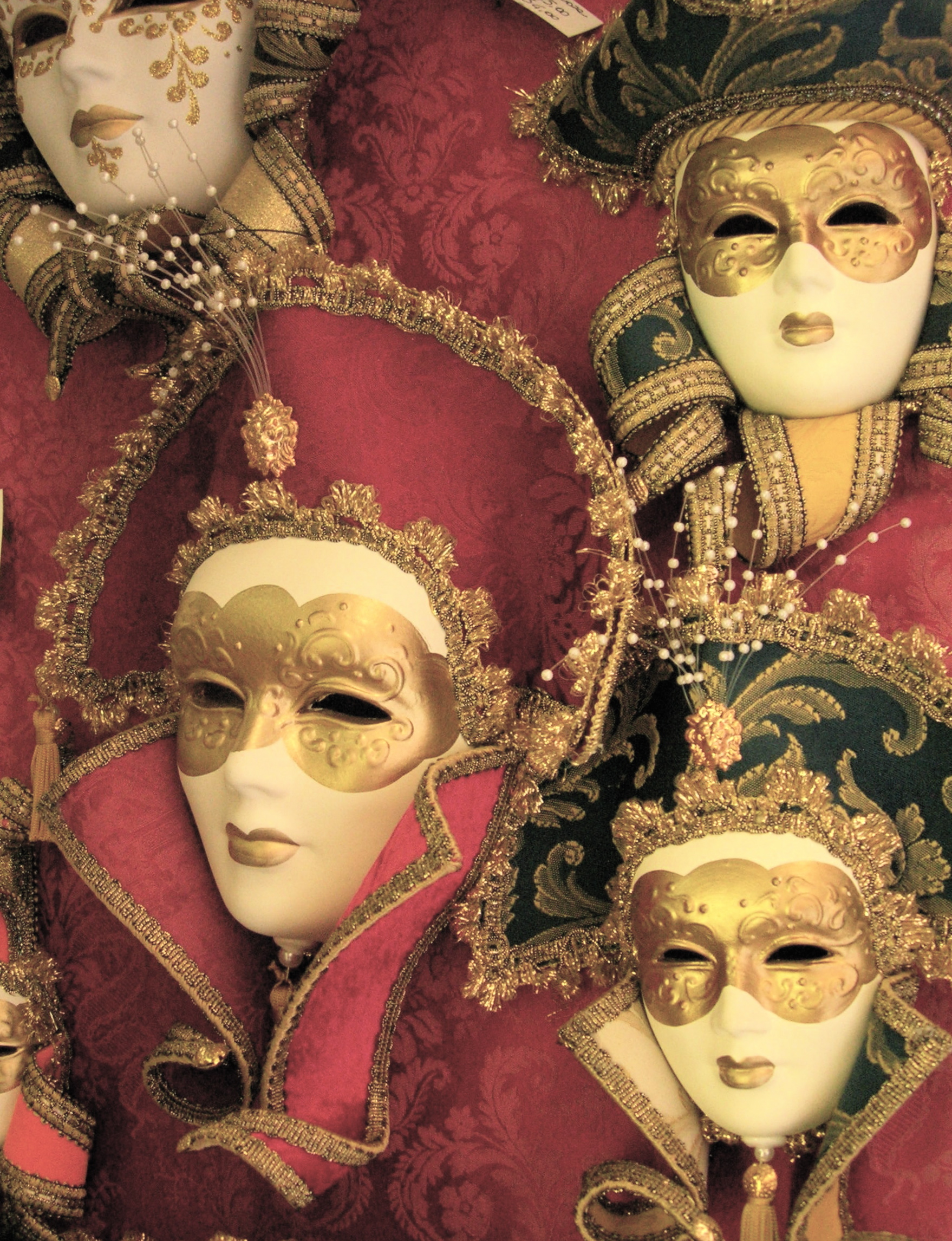 Carnavalia